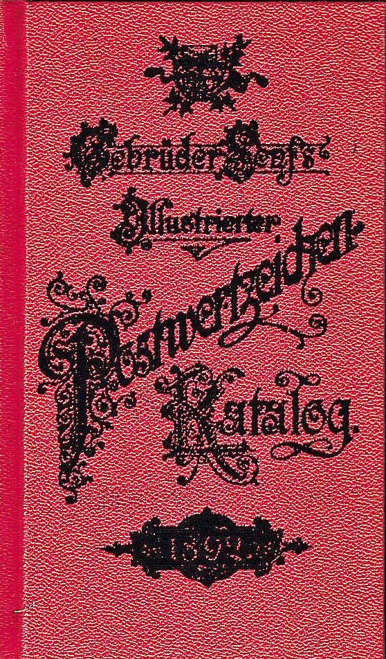 Gebrüder Senfs Postwertzeichen-Katalog 1892.